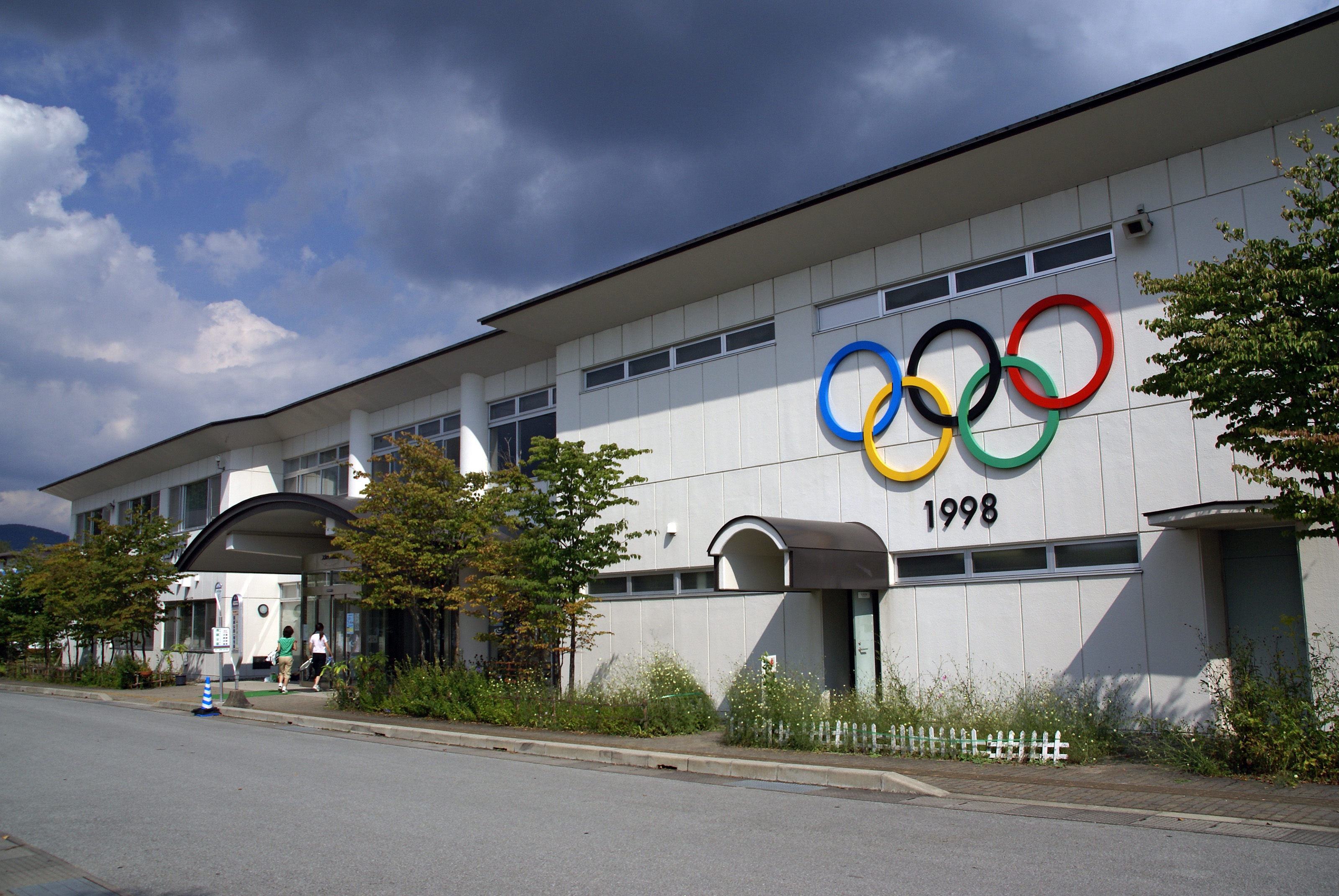 SCAP Karuizawa on Kazakoshi Park in Karuizawa, Nagano prefecture, Japan